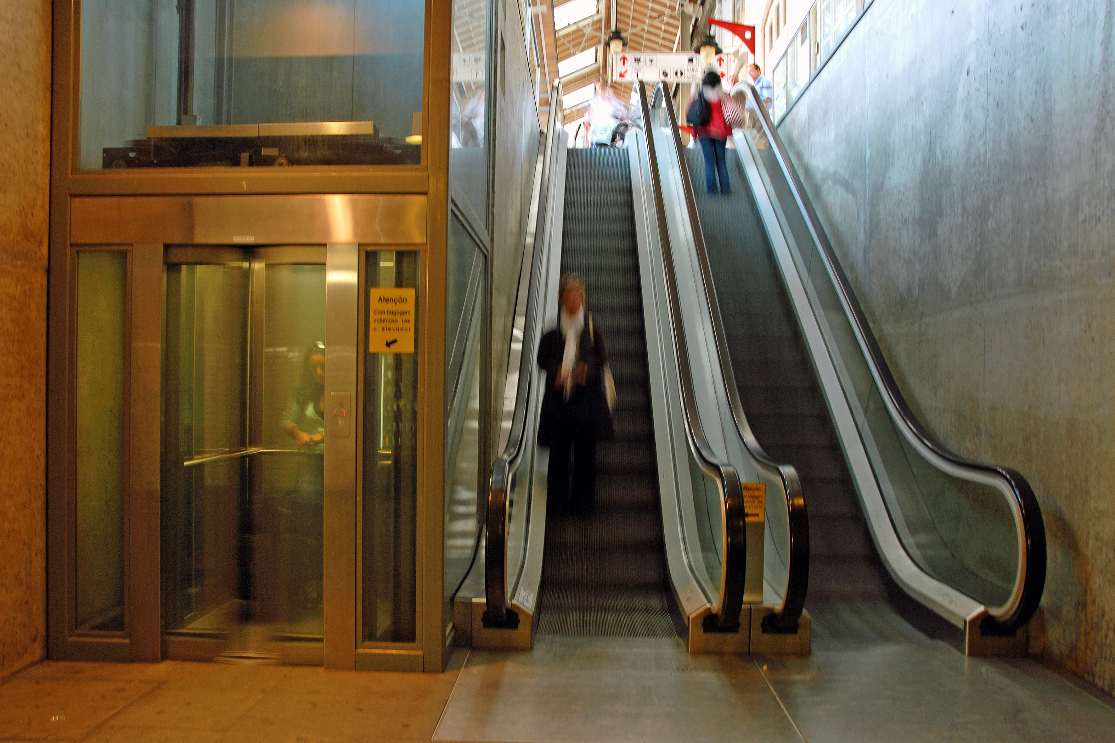 Campanhã-Estação Ferroviária de Campanhã This file was uploaded for Wiki Loves Monuments in Portugal with the unique identifier 97023030.